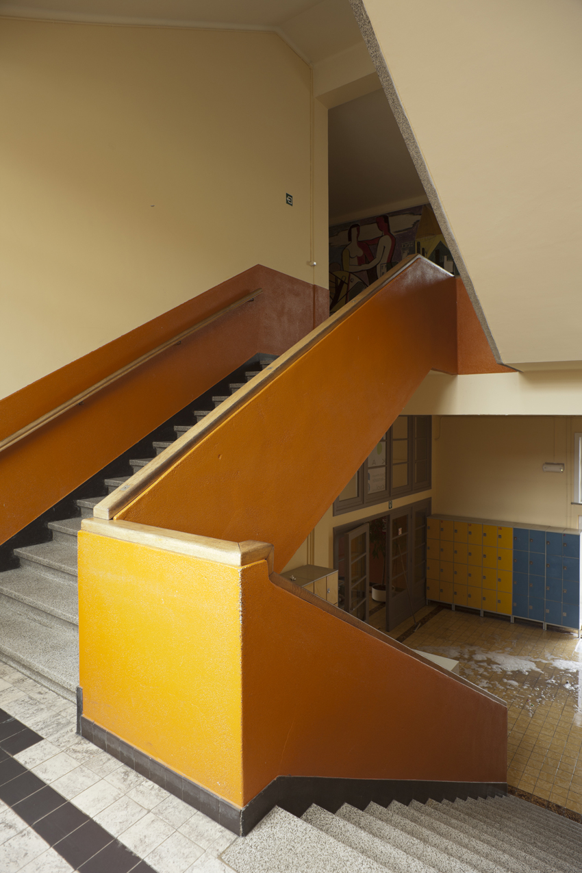 Koninklijk Atheneum. Modernistische school, opgericht in 1947-49 in opdracht van het Ministerie van Openbare Werken naar een eigen ontwerp van 1946, gesigneerd door ir. Zerck